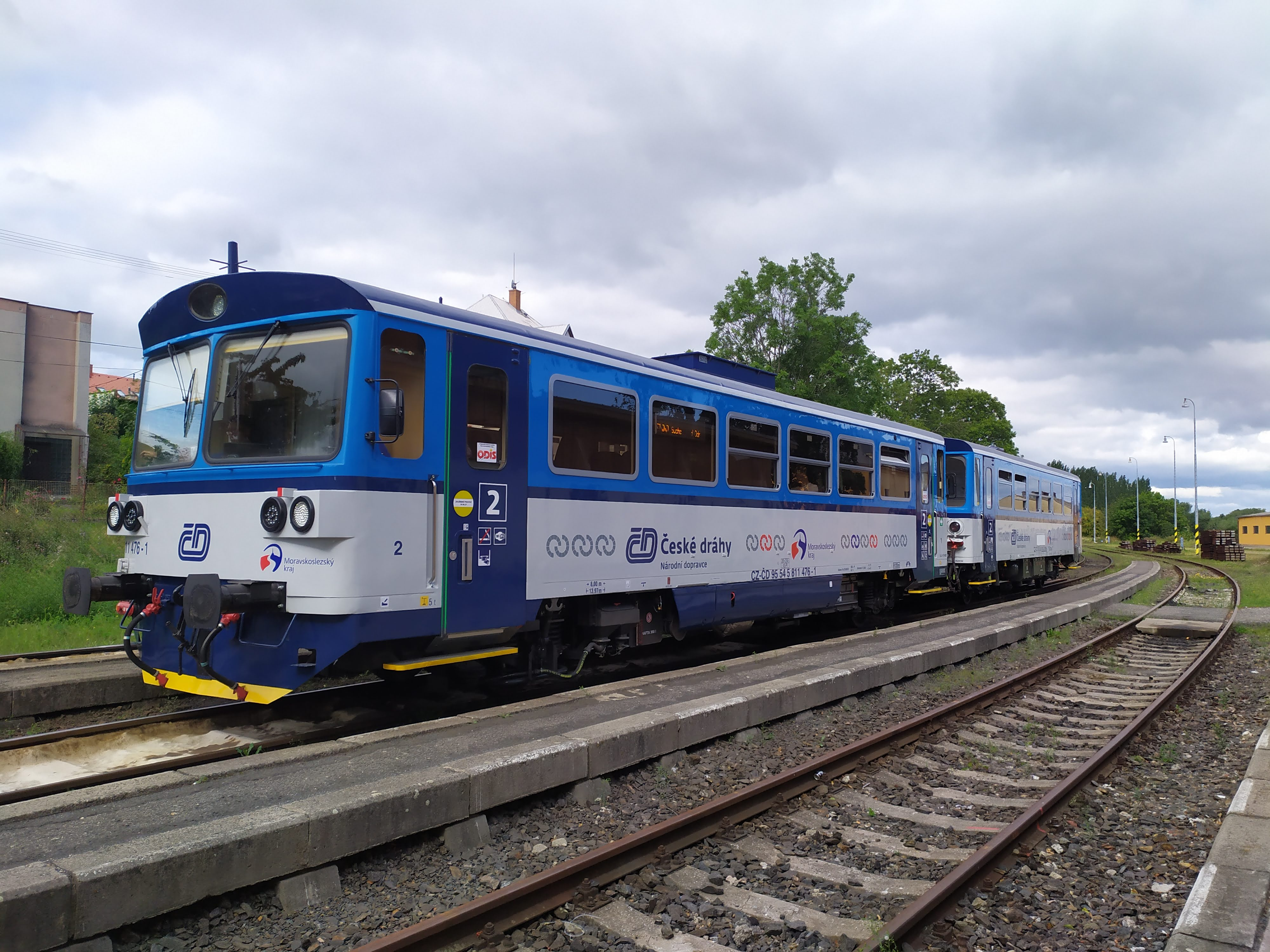 motorový vůz 811 (2020)